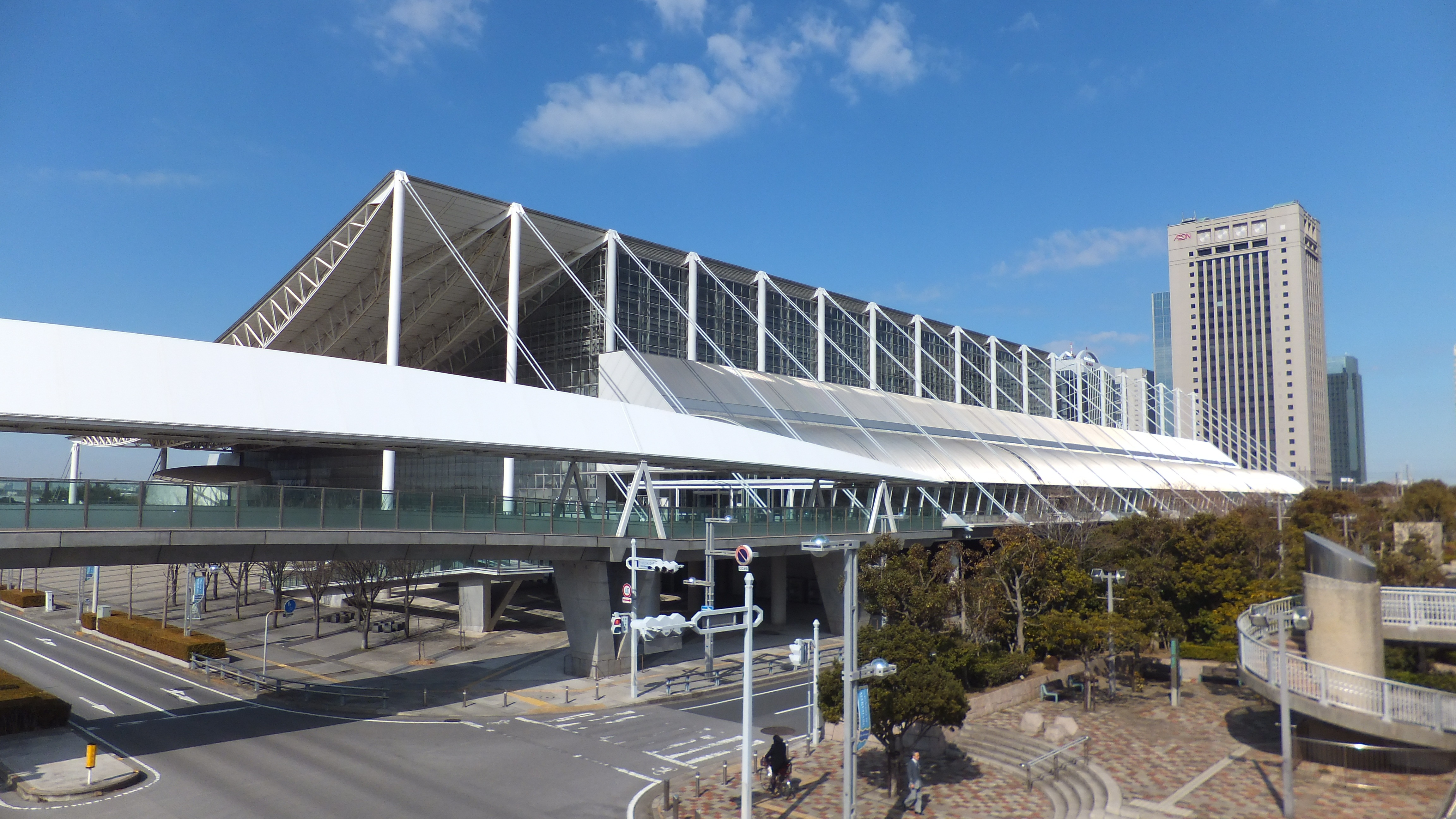 幕張メッセ国際展示場棟9～11ホール